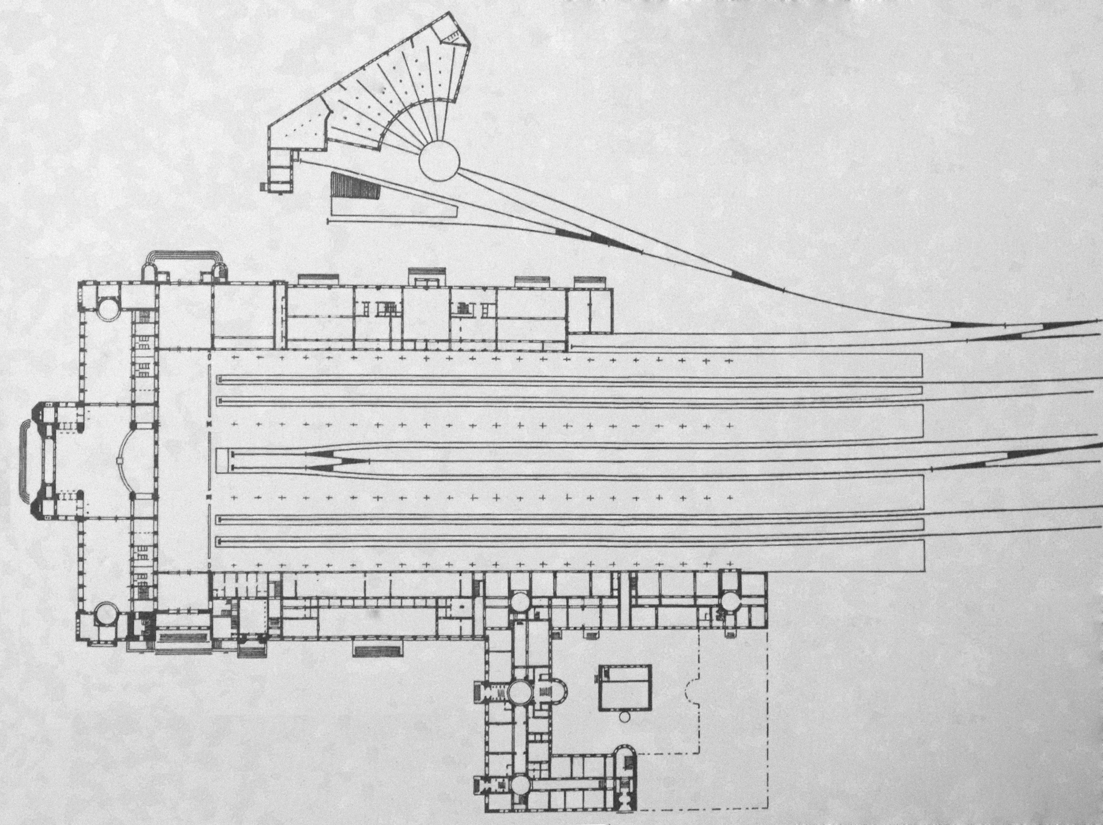 Helsingin rautatieaseman alkuperäinen pohjapiirustus